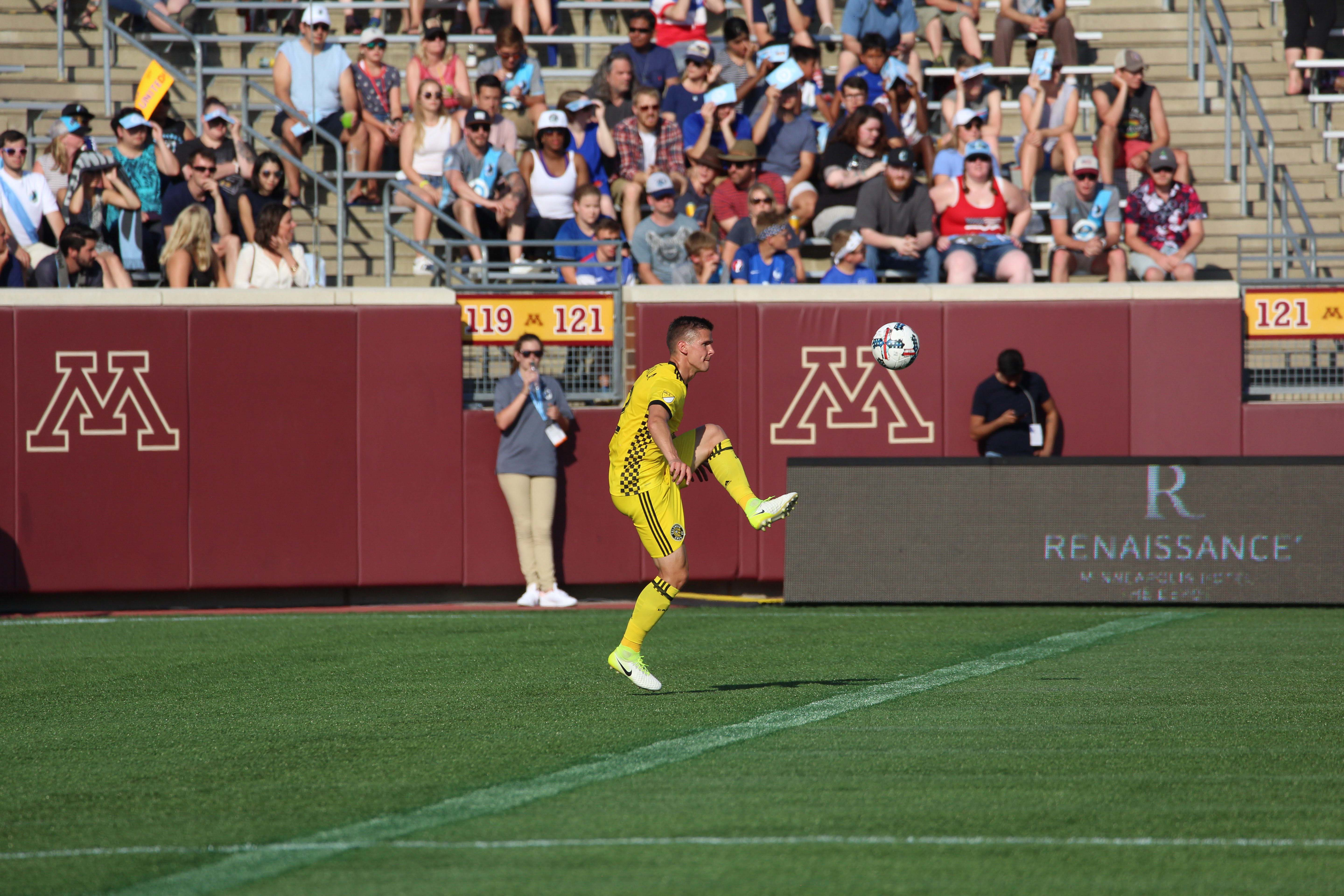 Jukka Raitala - Columbus Crew - MLS - Finland